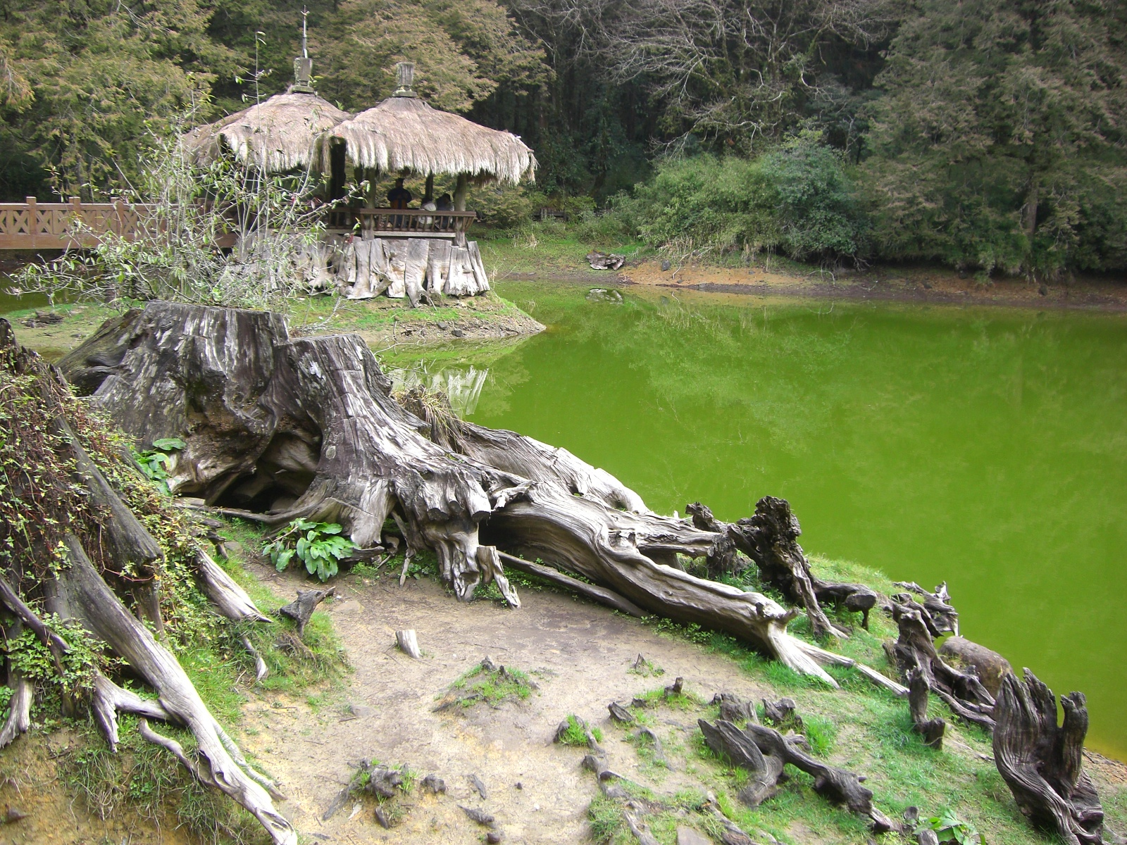 阿里山景點姊妹潭的姊潭。